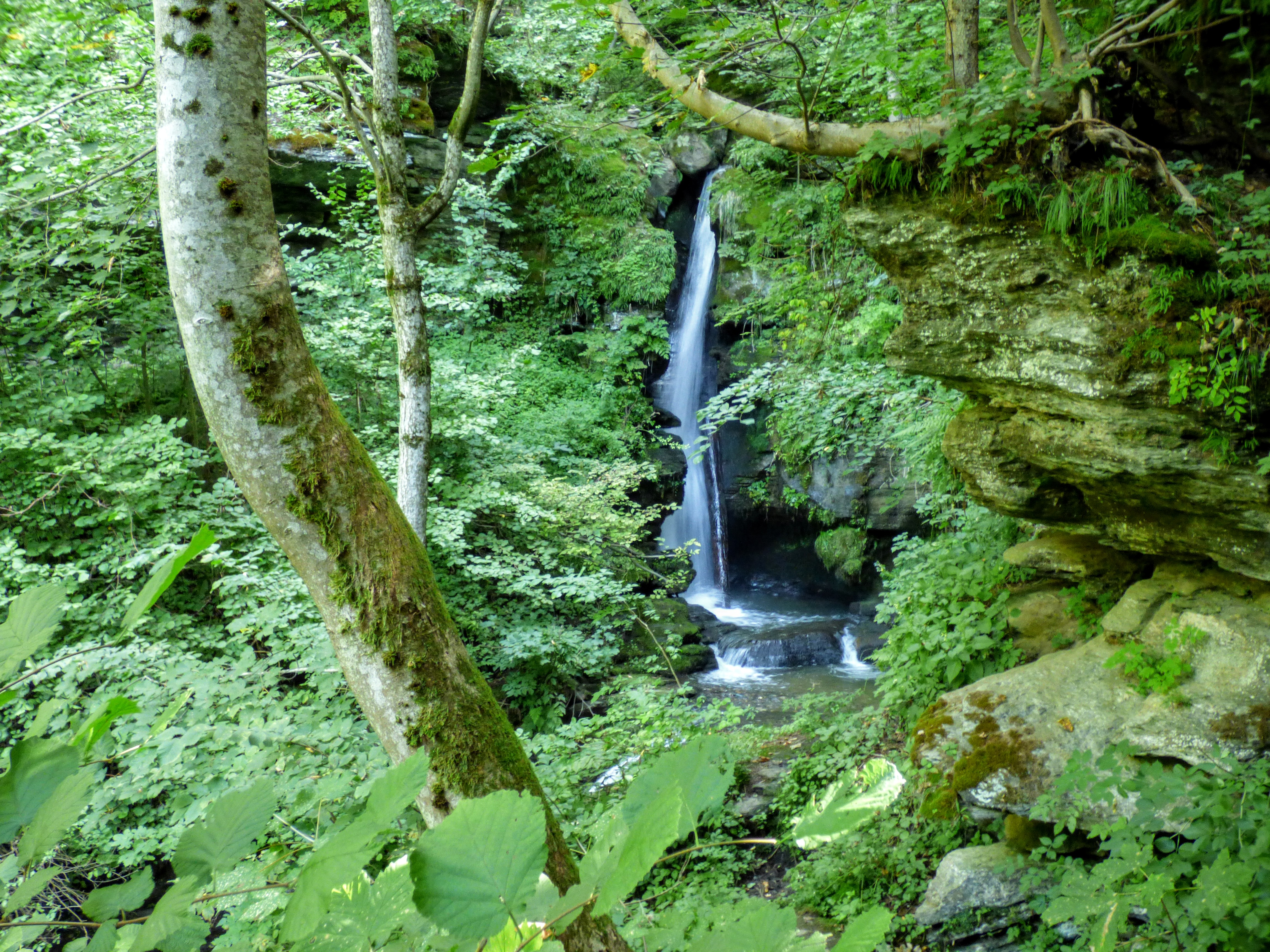 Harter Bach, nördlich von Glantschach (Gemeinde Liebenfels)